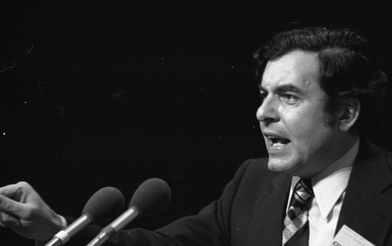 22. Bundesparteitag der CDU in Hamburg (MdB Elmar Pieroth) 18.-20.11.1973